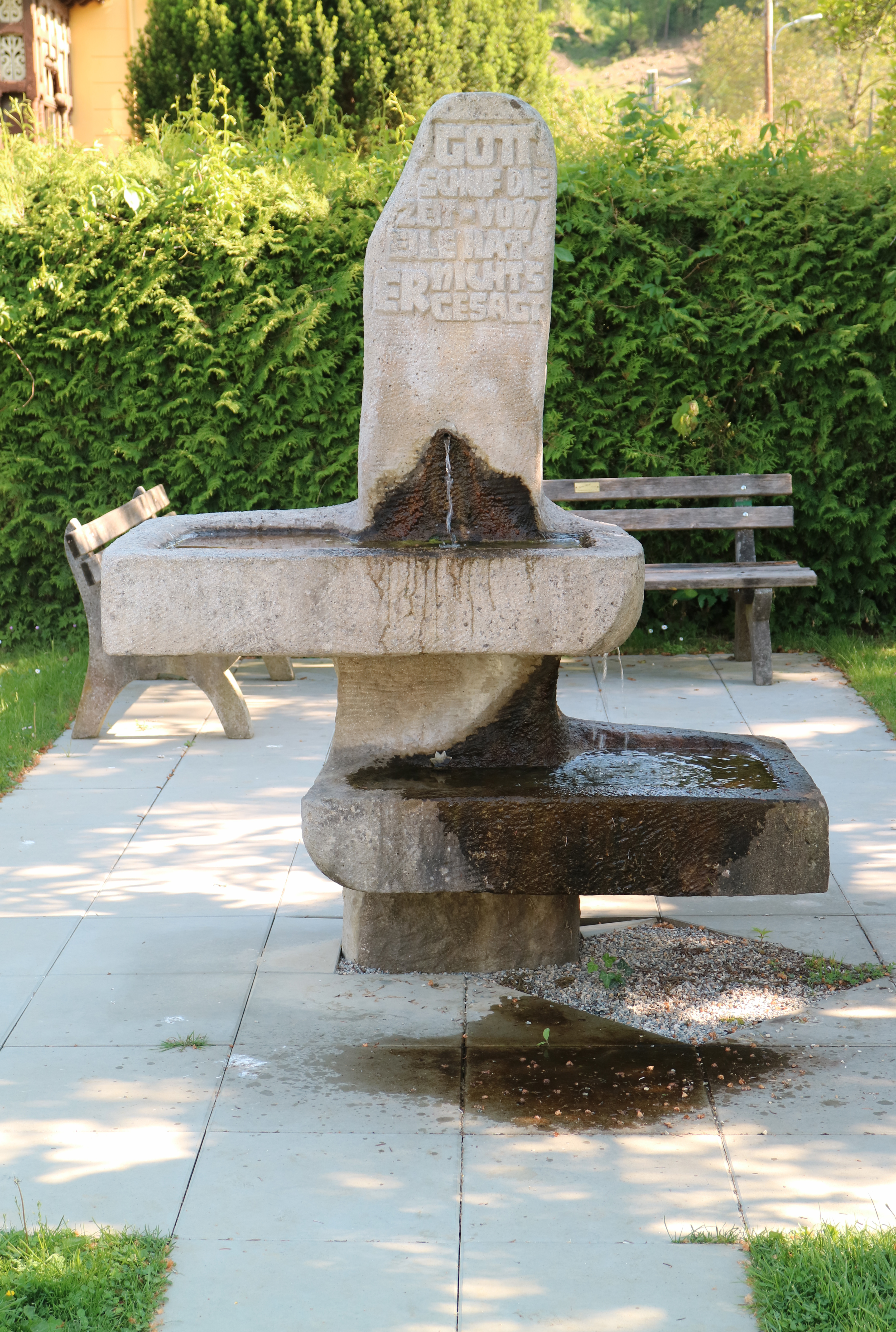 Brunnen von Alfred Schlosser in Judendorf-Straßengel